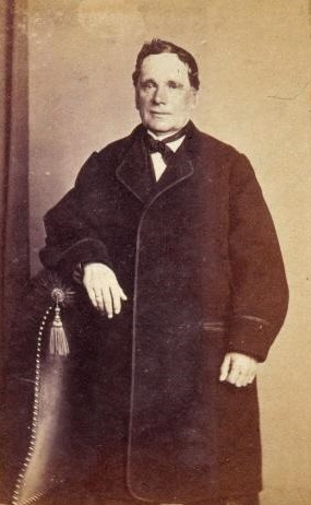 José Caveda, fotografía de J. Laurent. Museo de Historia de Madrid